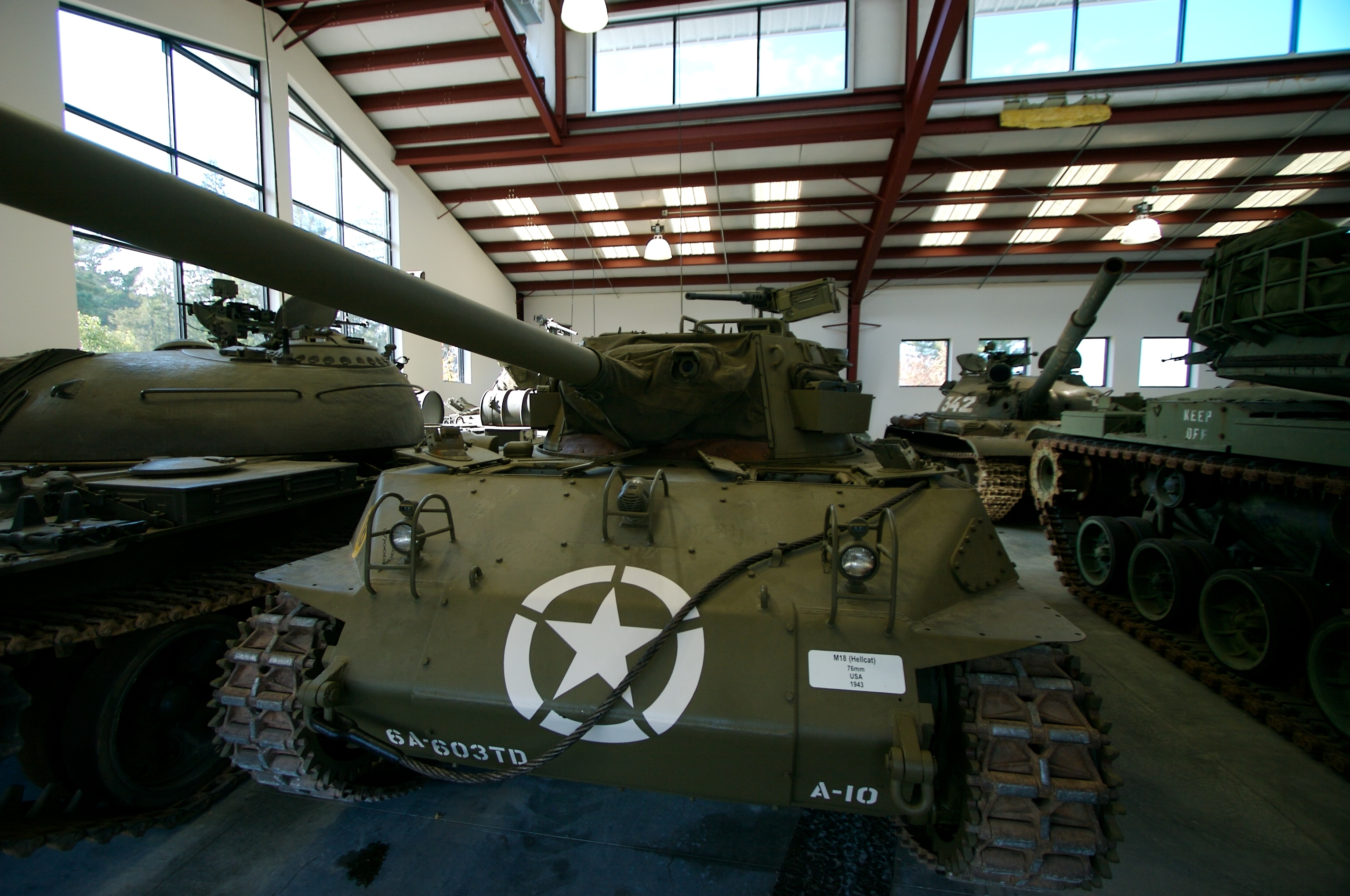 US M18 Hellcat tank destroyer.